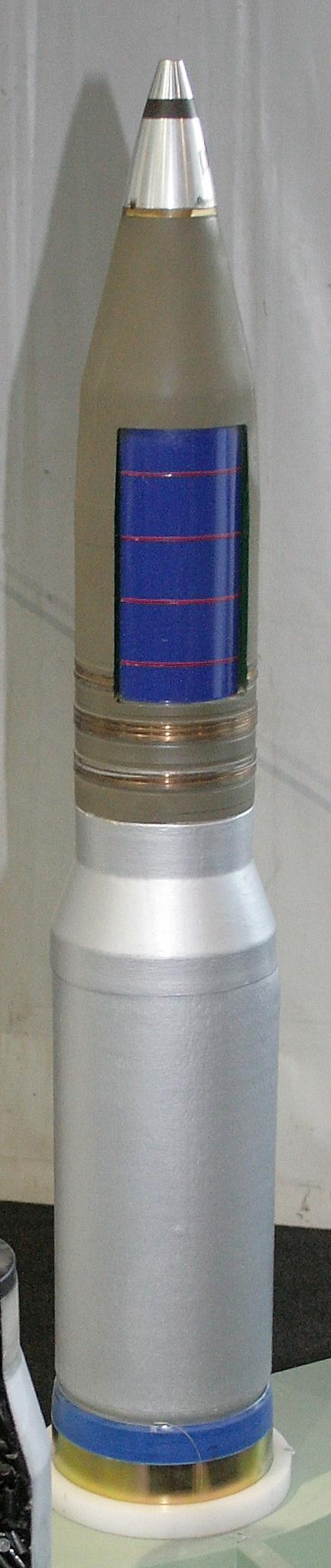 "Calanit" APAM 120mm tank munition פגז כלנית 120 מ"מ